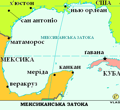 Мексиканська затока